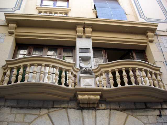 Casa Ribas Crehuet